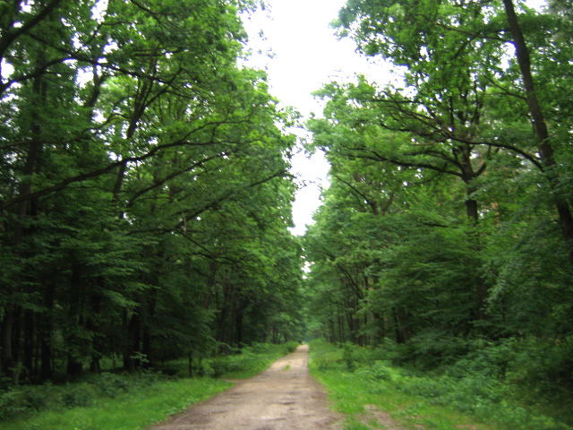 Niepołomice Forest